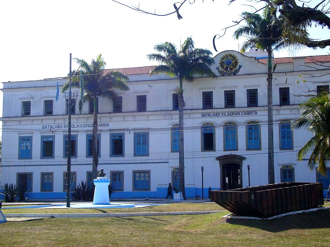 Batalhão Escola de Engenharia Villagran Cabrita